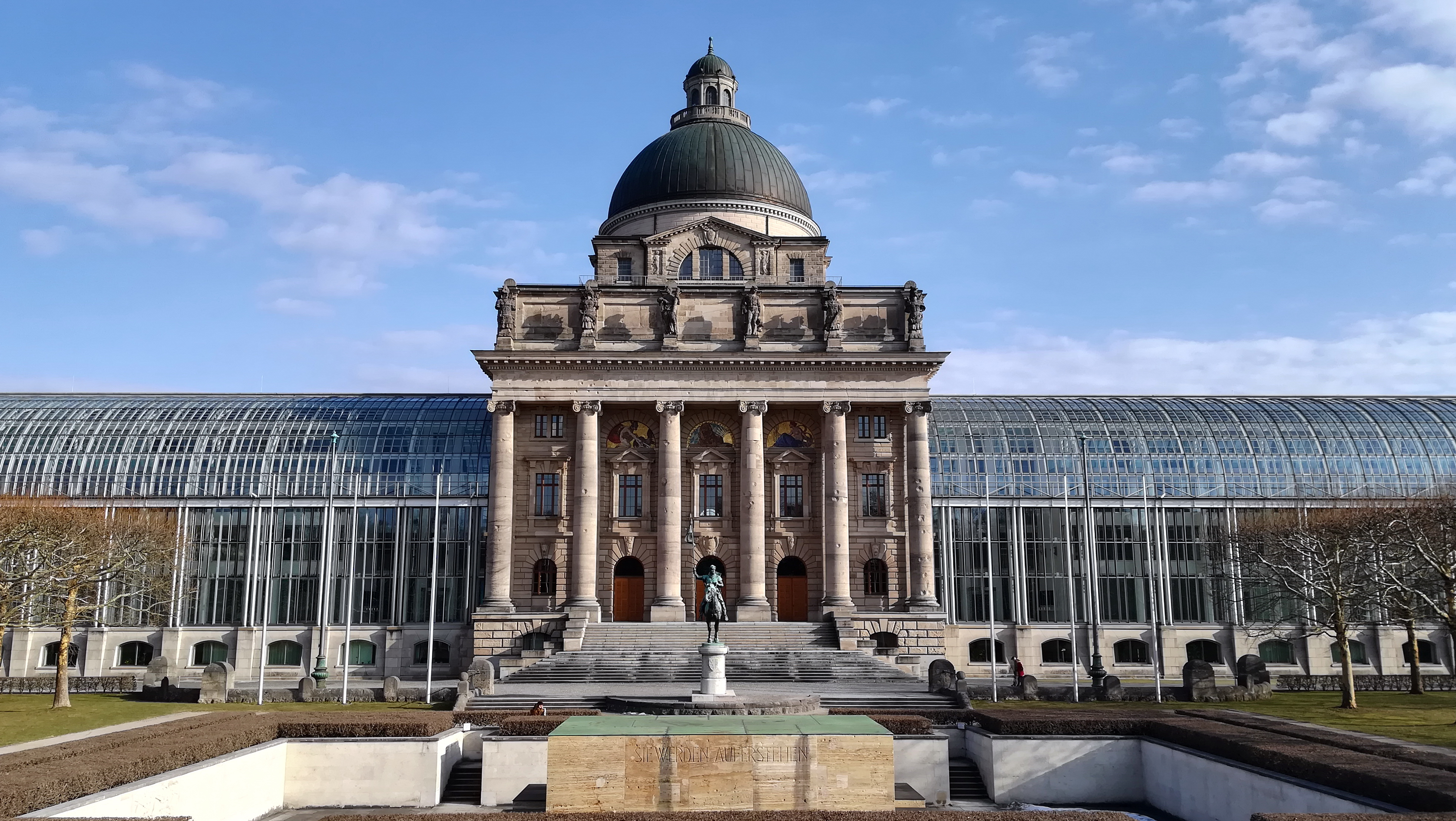 Die Bayerische Staatskanzlei ist eine oberste Landesbehörde, die zur Unterstützung des Ministerpräsidenten und der Staatsregierung in München eingerichtet wurde.